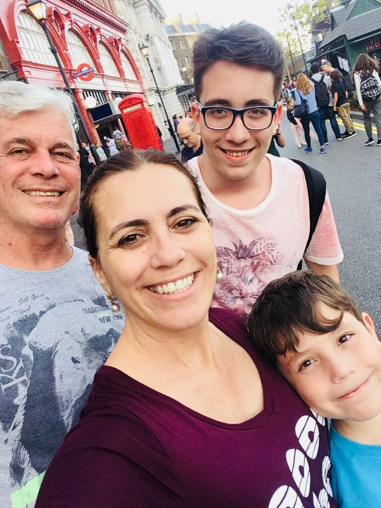 Rosana valle e família em janeiro de 2018